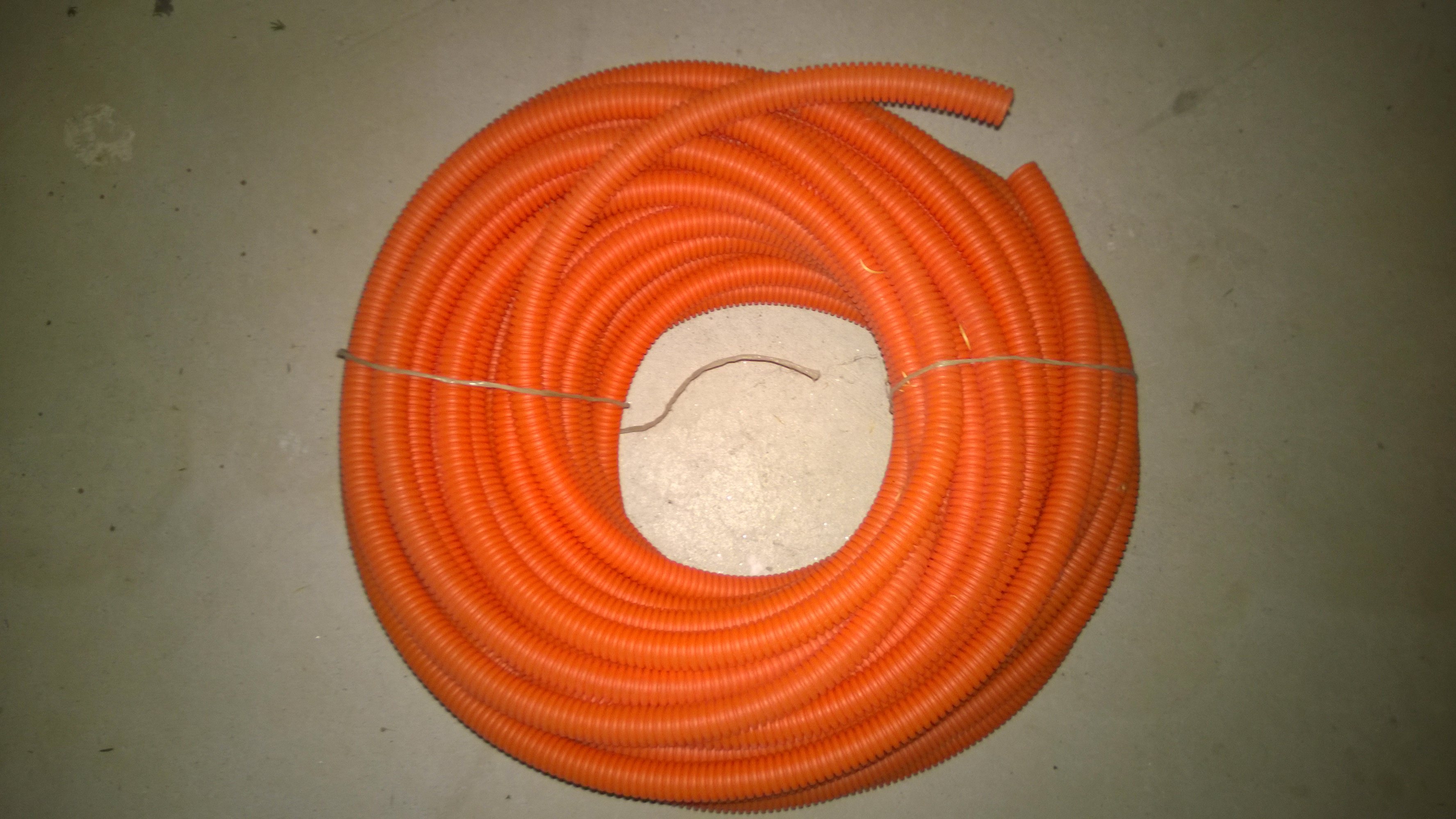 Slika rebraste pvc cevi.